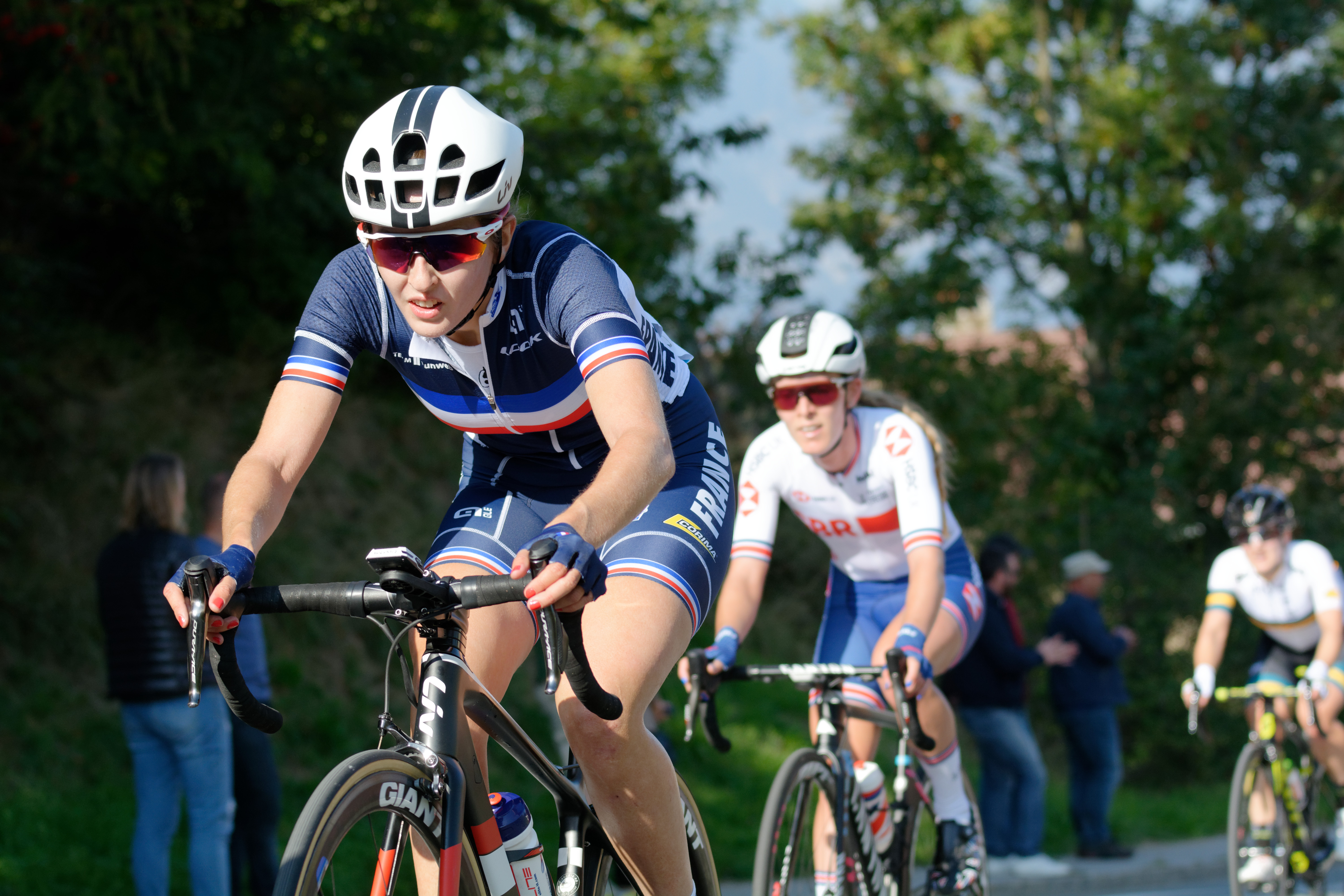 D71_6017_DxO